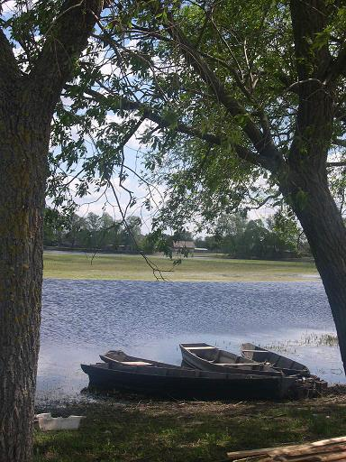 Dorp aan de Pripyat, fotograaf: Jan Nijman, mei 2004